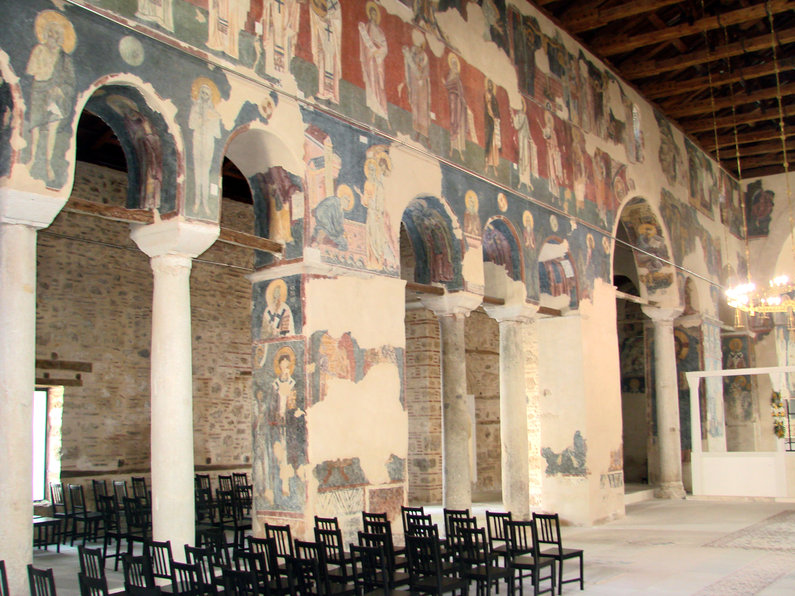 Ναός Παλαιάς Μητρόπολης Βέροιας«Ναός Παλαιάς Μητρόπολης Βέροιας»